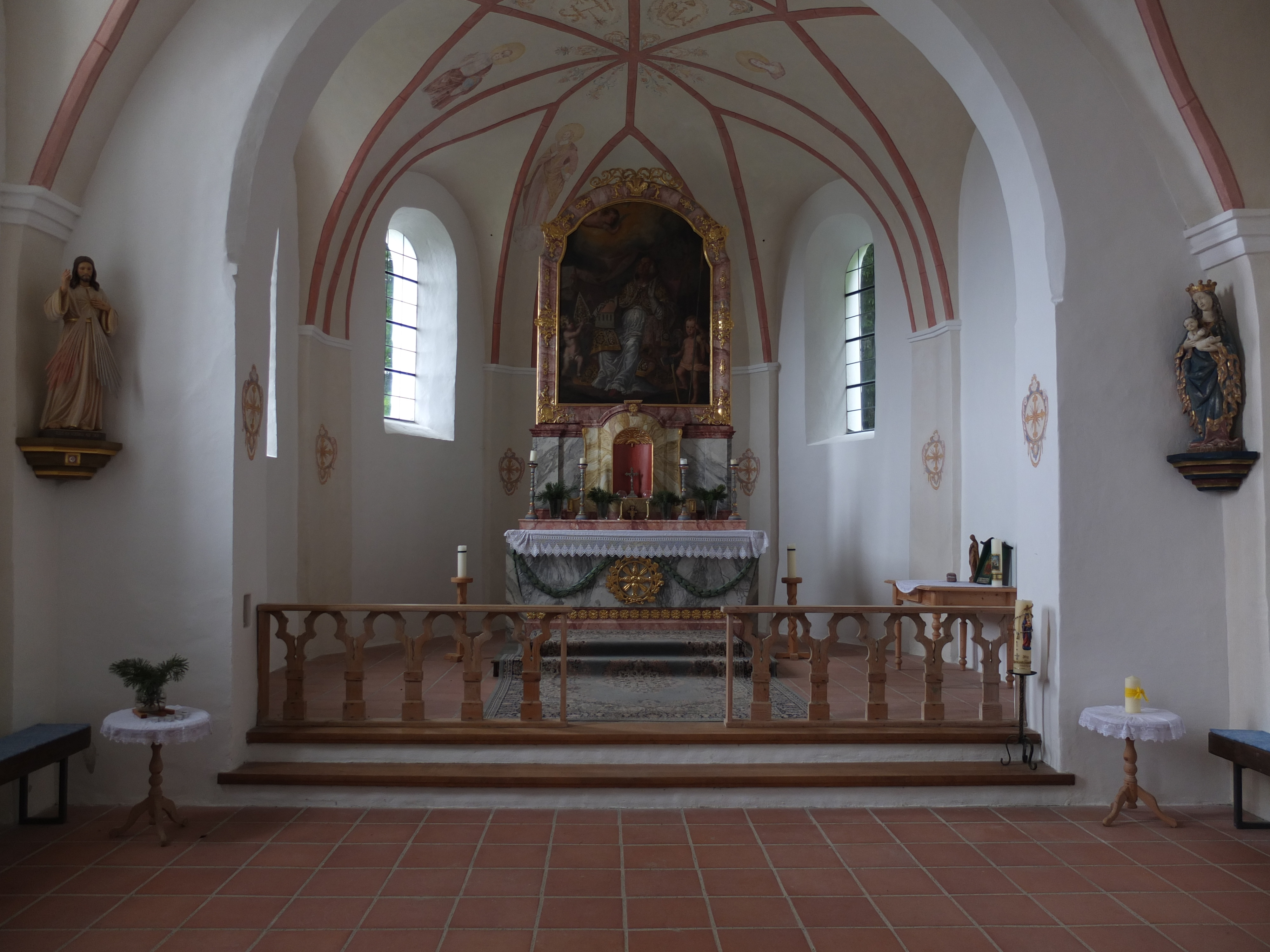 Innenansicht der Schanppenkirche